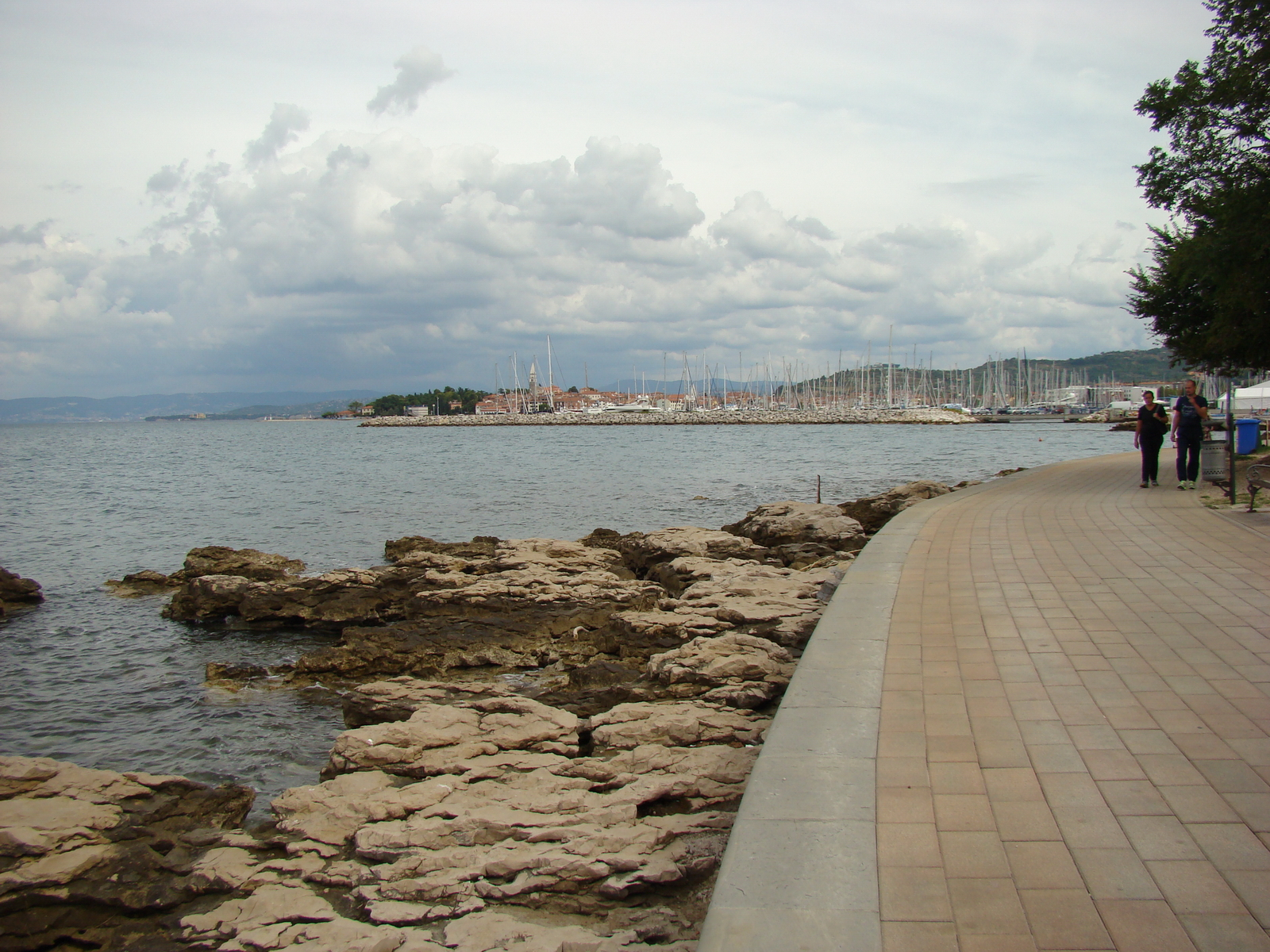 Набережная в Изоле